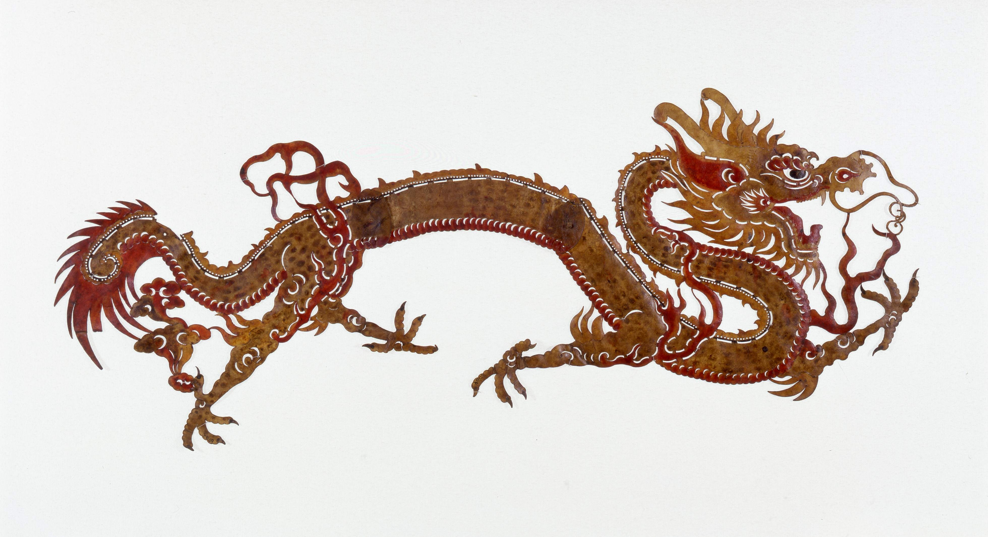 Chinesisches Schattentheater, Drache, Provinz Sichuan, 18. Jahrhundert © DLM/C. Perl-Appl